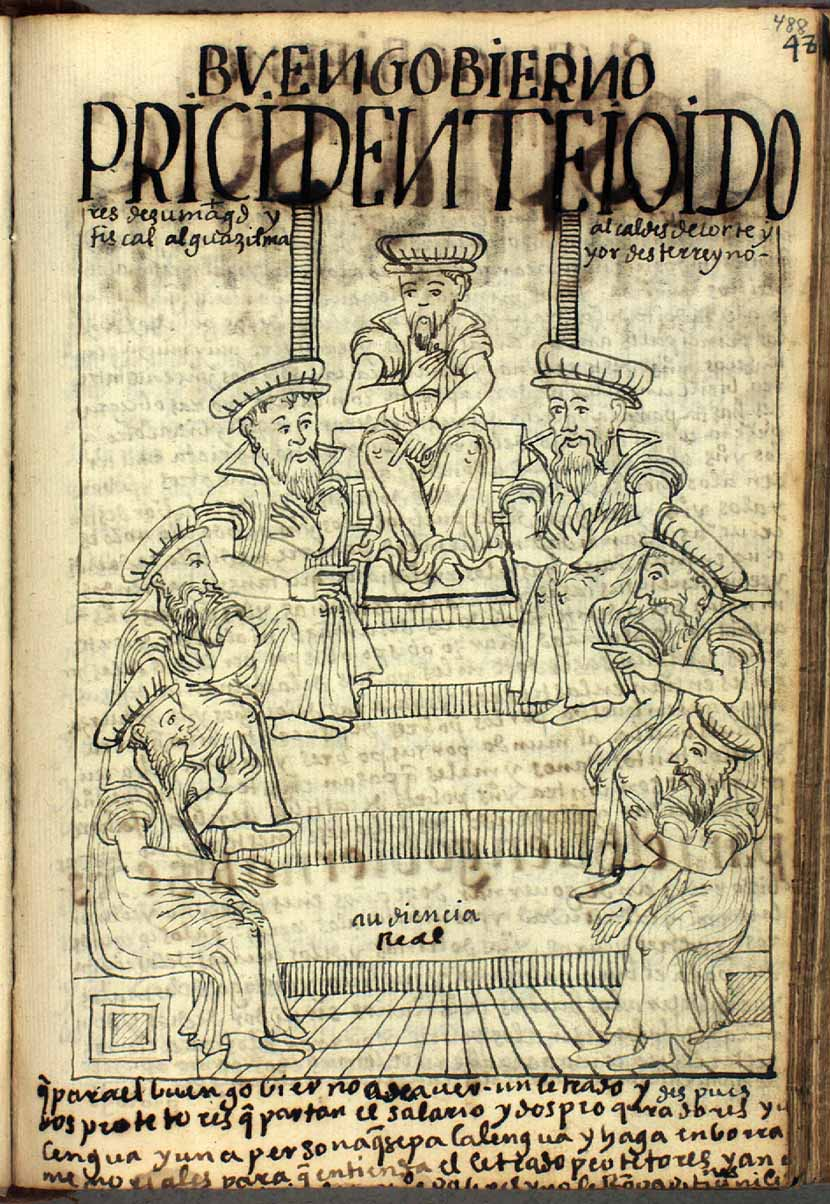 Audiencia Real: Presidente y oidores de su majestad y alcaldes de corte y fiscal, alguacil mayor de este reino. From Felipe Guaman Poma de Ayala (ca. 1550-1616): Nueva corónica y buen gobierno. (Ms. Copenhagen, Royal Library, GKS 2232), page 488